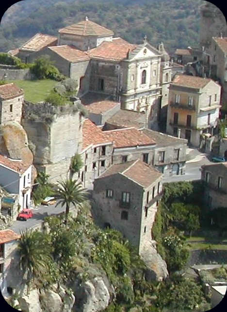 Basilica Madonna della Catena (esterni) This is a photo of a monument which is part of cultural heritage of Italy.